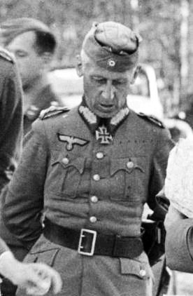 Sowjetunion. Generaloberst Hermann Hoth.